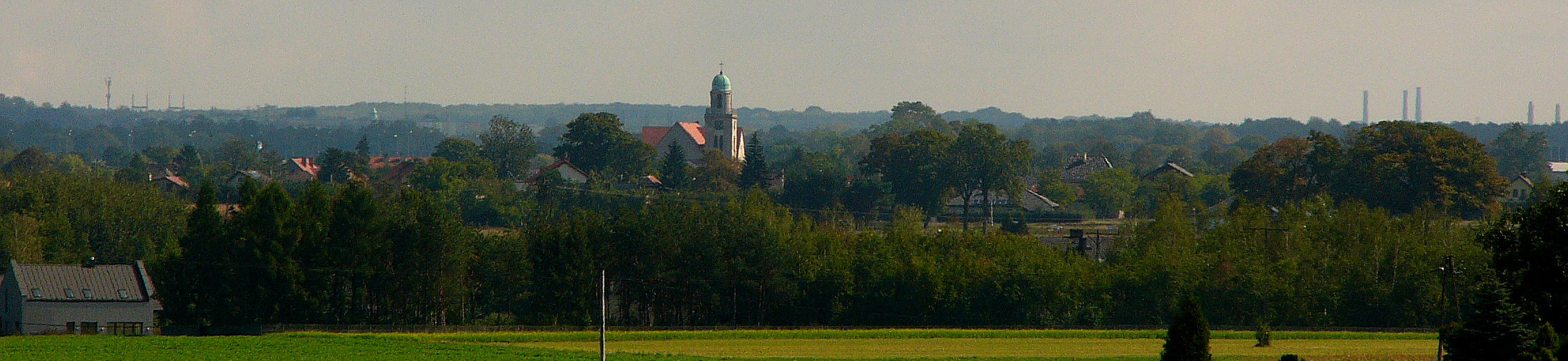 Blick auf Ziemięcice.